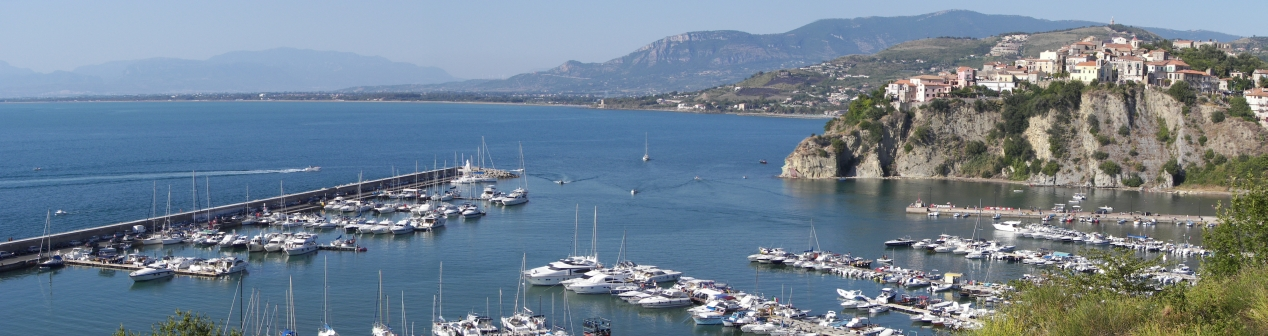 Porto di Agropoli